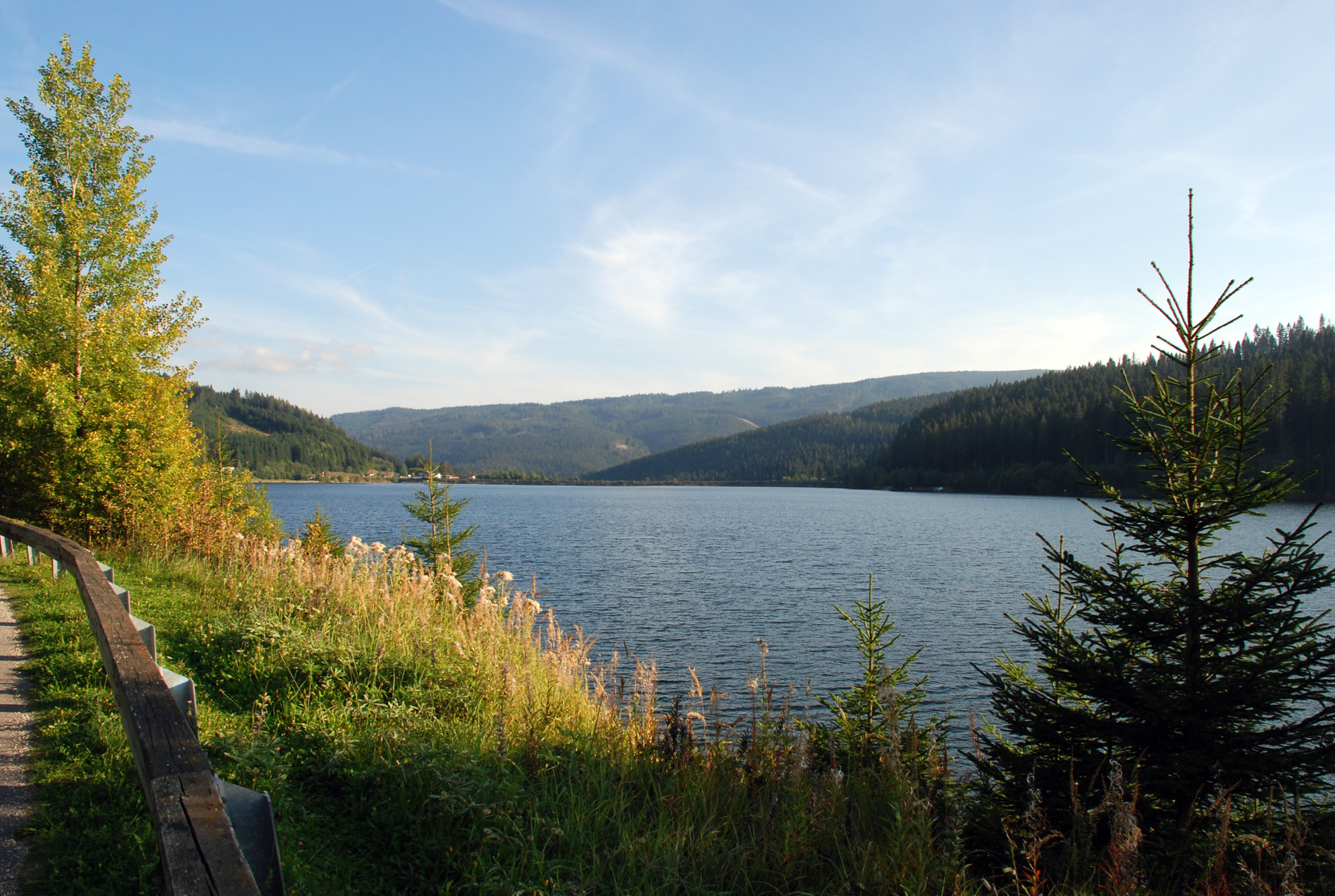 Soboth, Kärnten, Österreich: Sobothstausee bei St Vinzenz